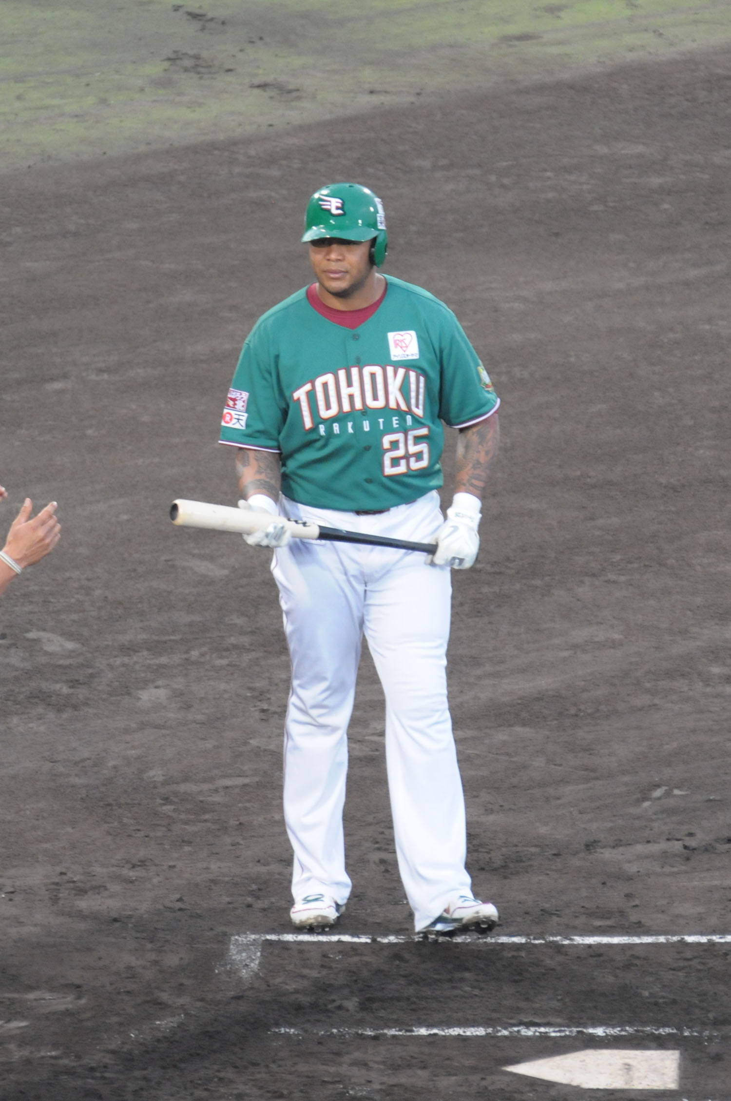 楽天イーグルス、アンドリュー・ジョーンズ選手。こまちスタジアムで。